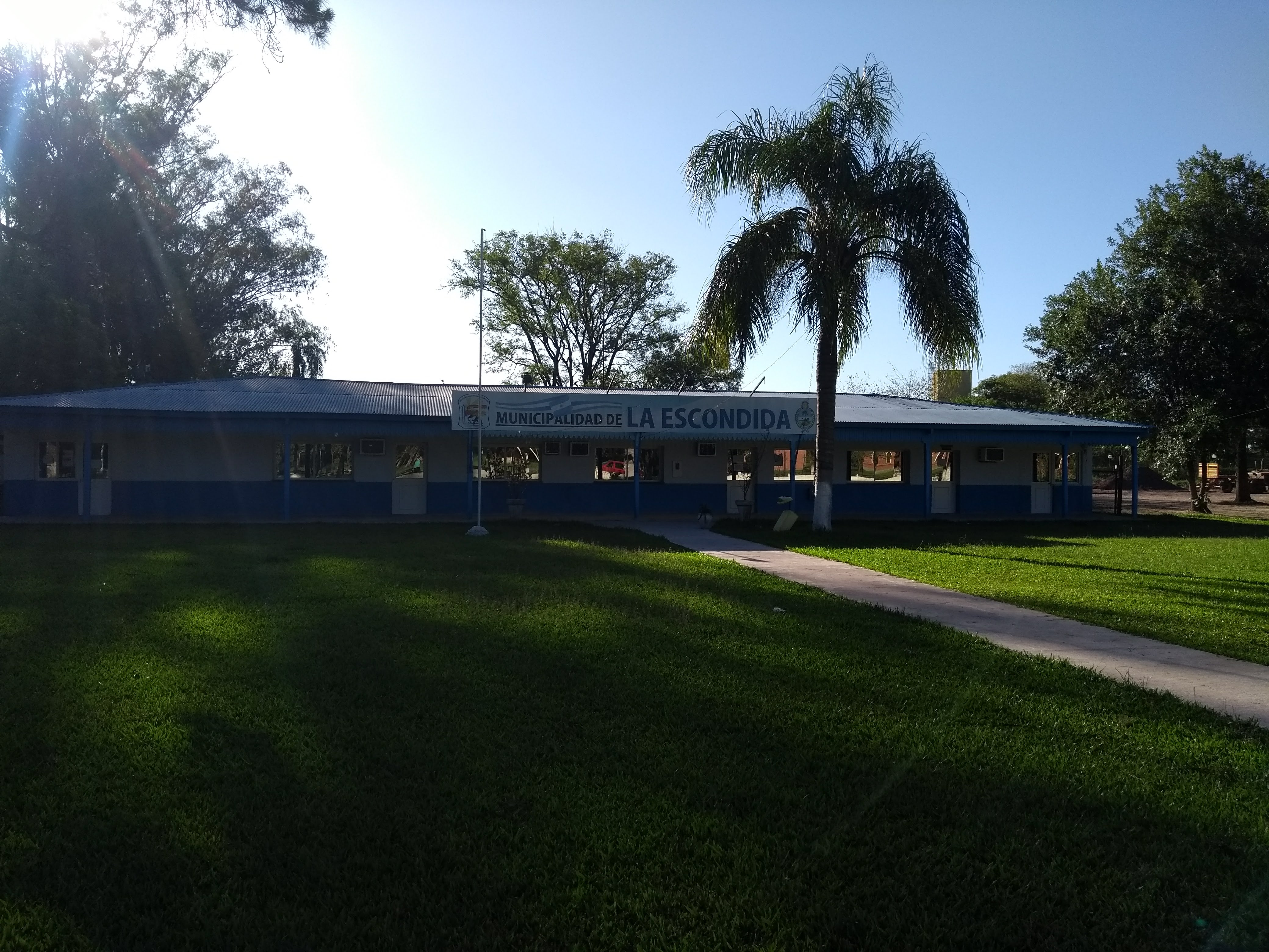 Vista del frente del edificio de la Municipalidad de La Escondida, Argentina.